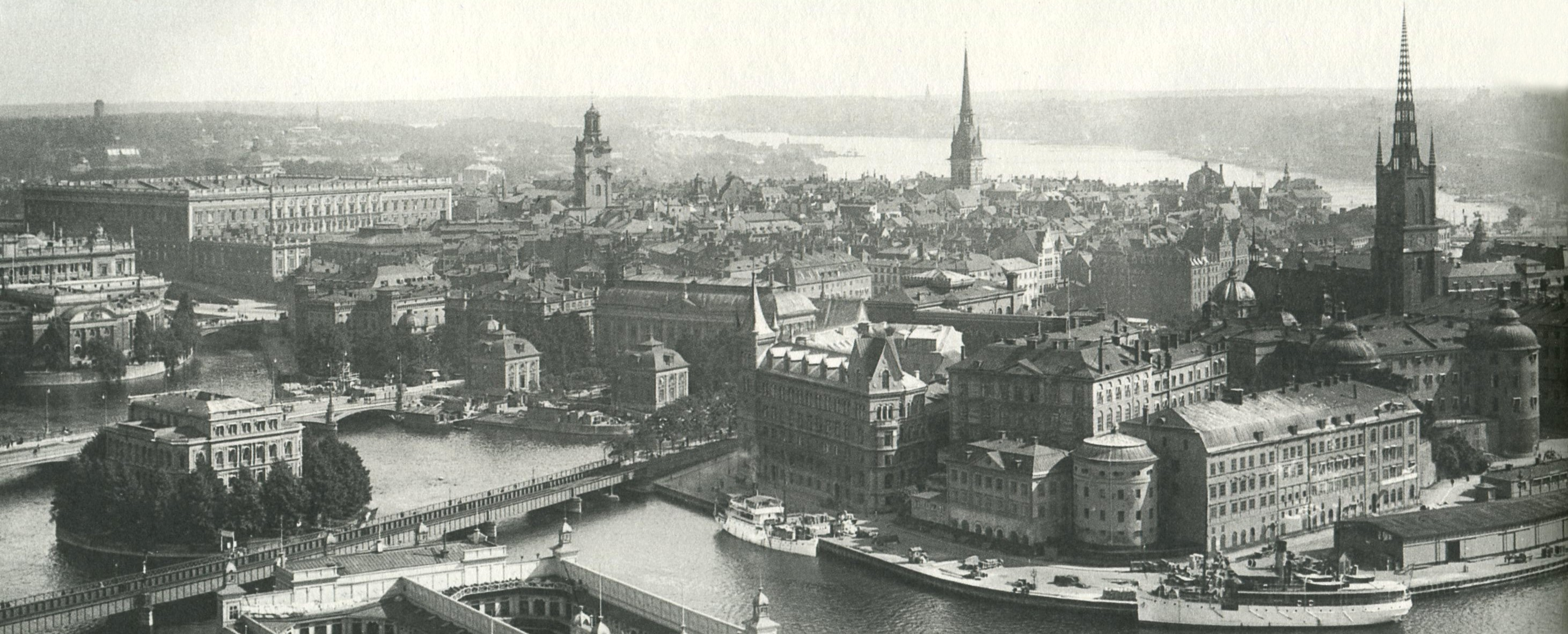 Panorama från Stadshustornet över Gamla stan och Riddarholmen